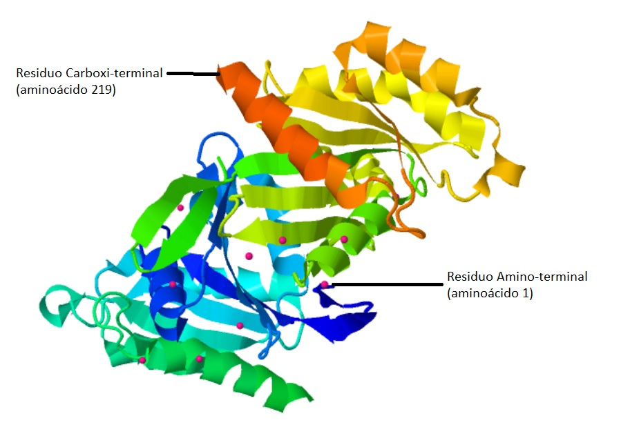 Estructura tridimensional de la proteina Rab3b unida a GDP